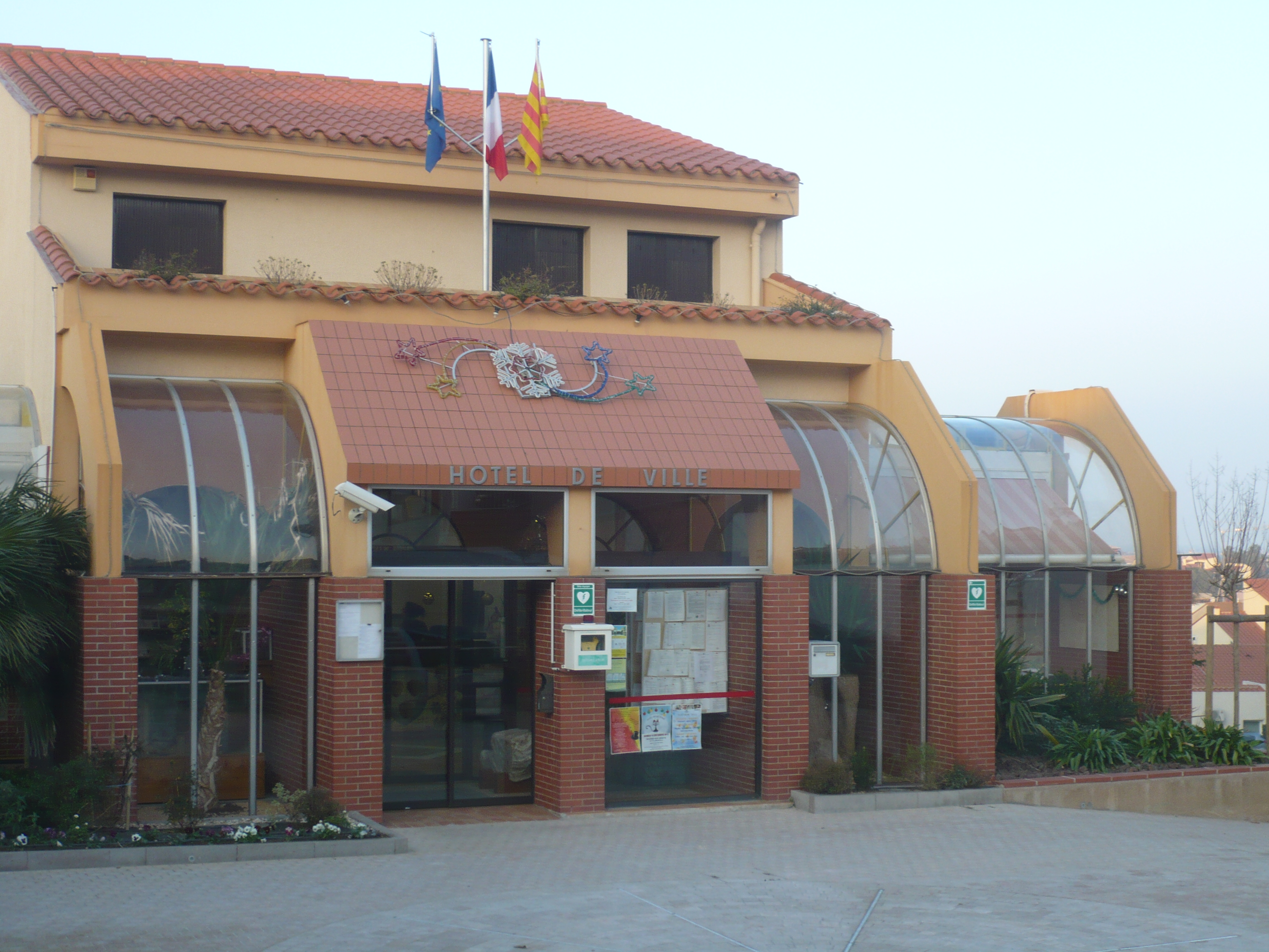 Mairie de Villeneuve-de-la-Raho